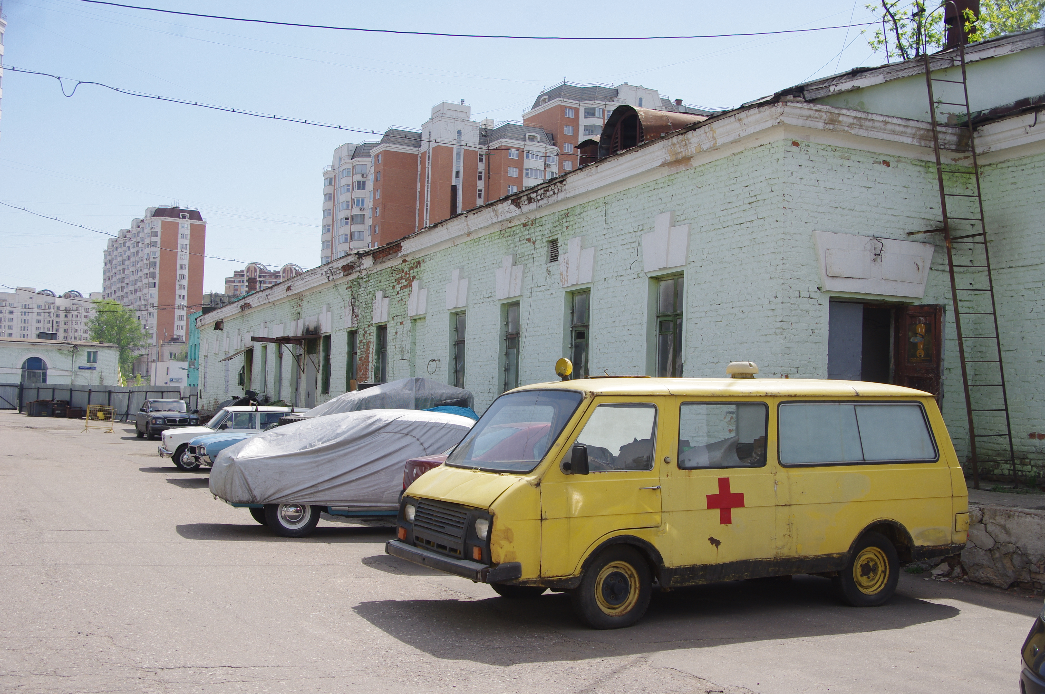 РАФ-2203, Московский музей ретро-автомобилей